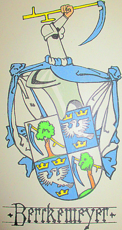 Wappen Berckemeyer aus dem Dt. Geschlechterbuch 1911.